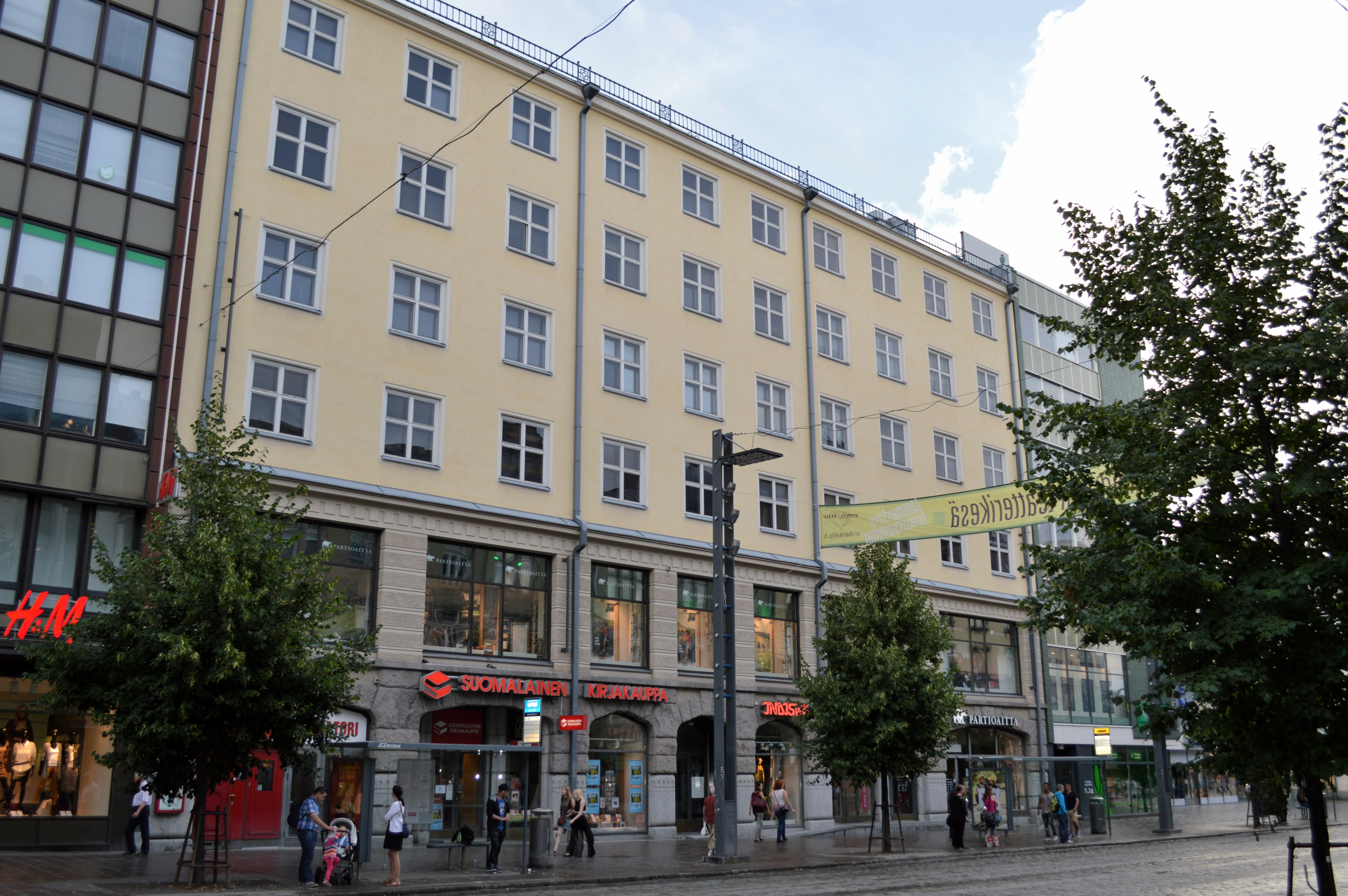 Tammeron talo